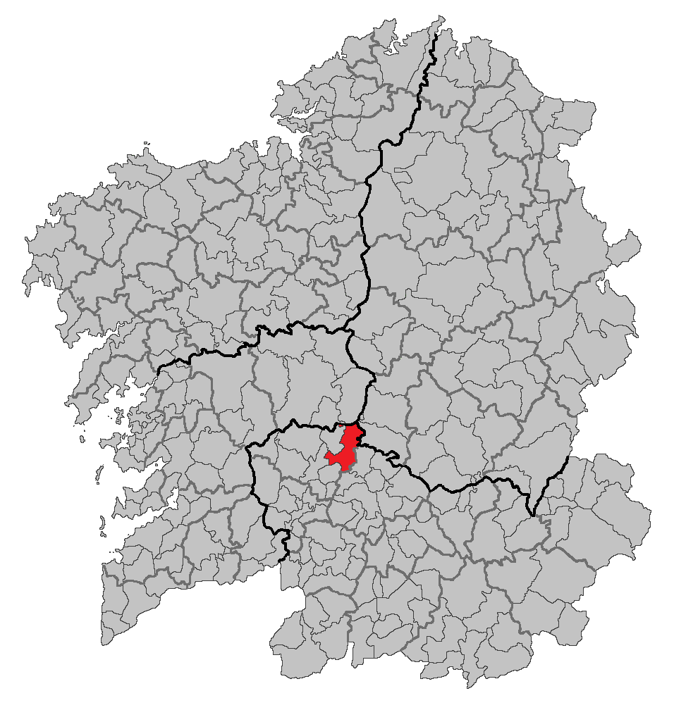 Mapa coa localización do concello de San Cristovo de Cea.